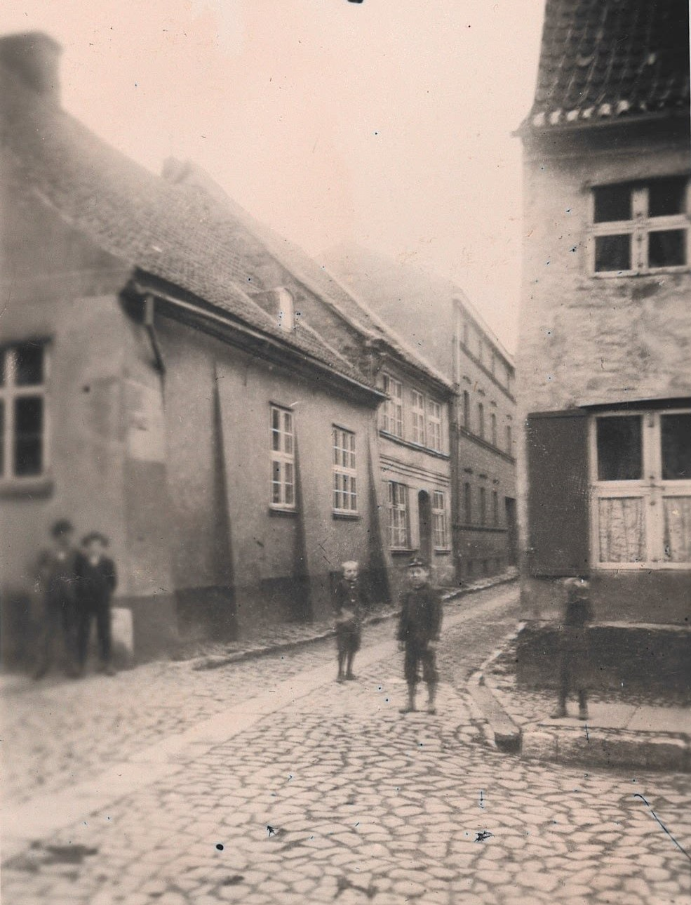 Greifswald: Blick durch die Lappstraße von St. Nikolai aus; in der Mitte der Breite Stein.